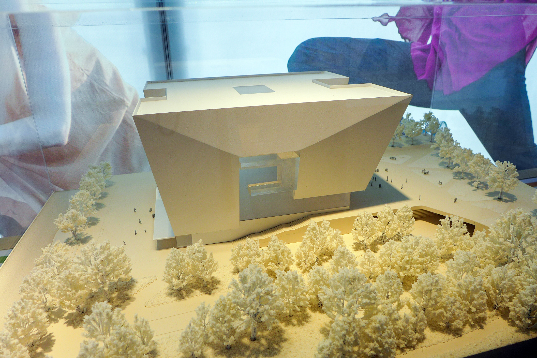 Hong Kong Palace Museum Model